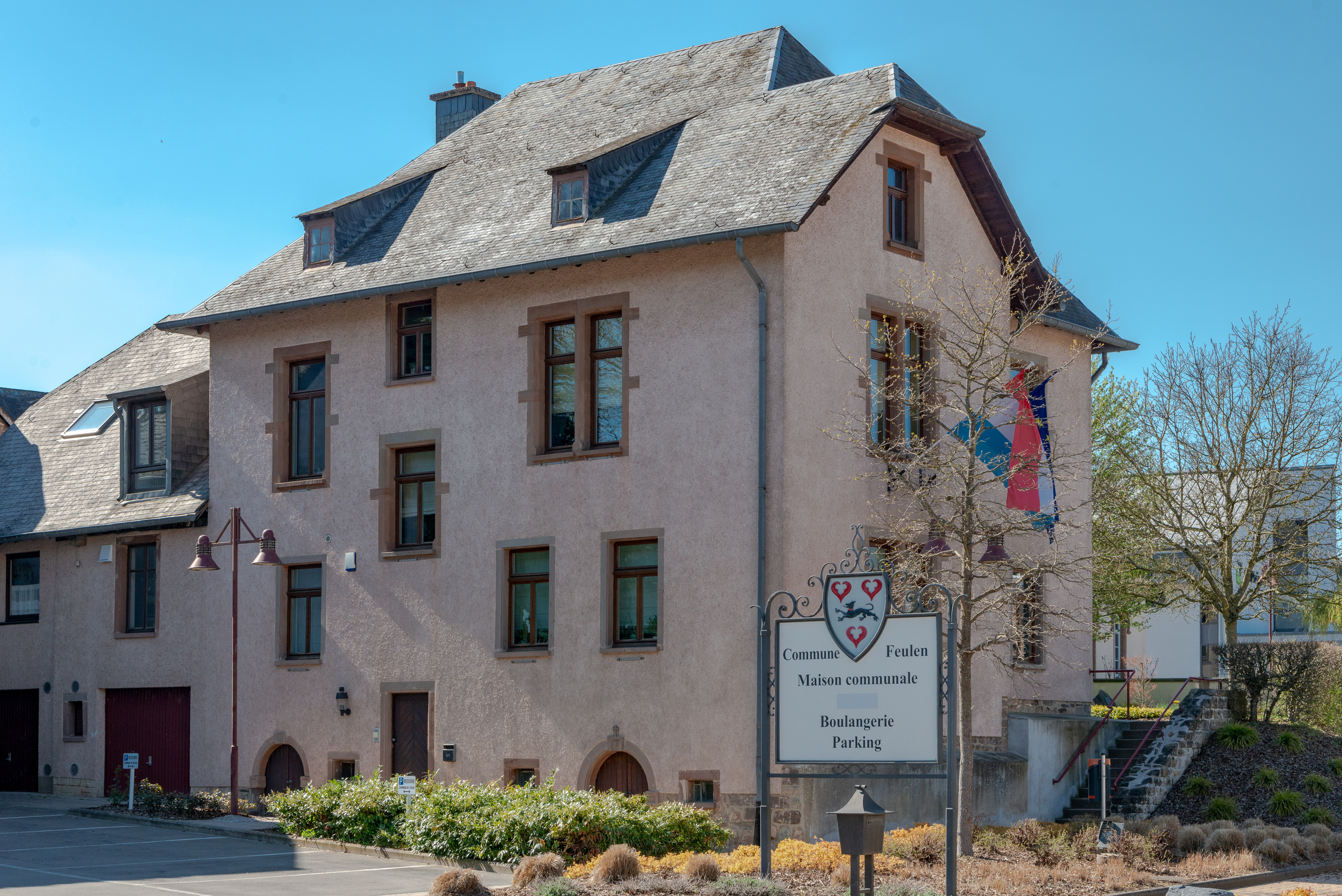 D'Feelener Märei zu Nidderfeelen.